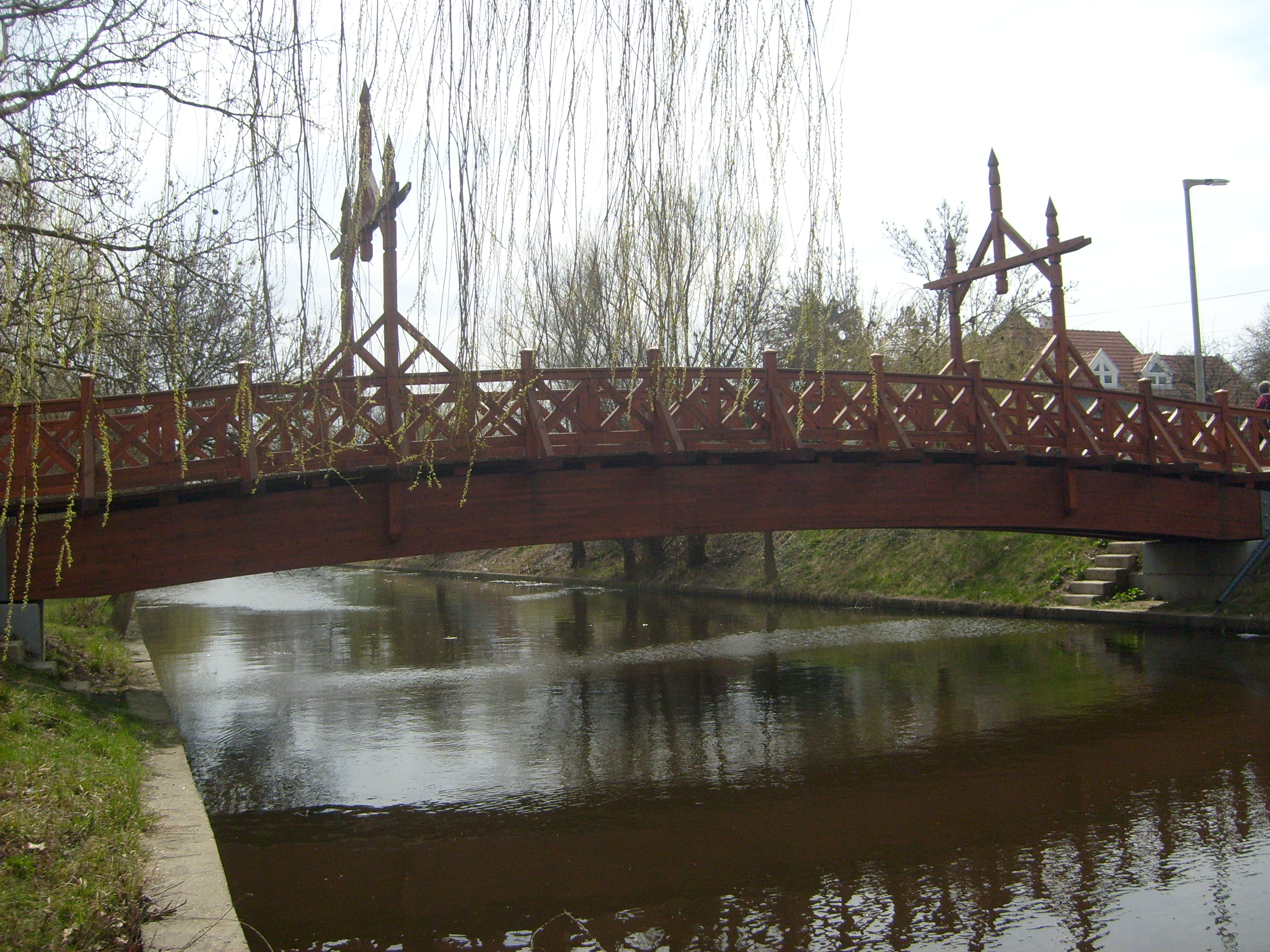 Békés, új Csók-híd oldanézetből